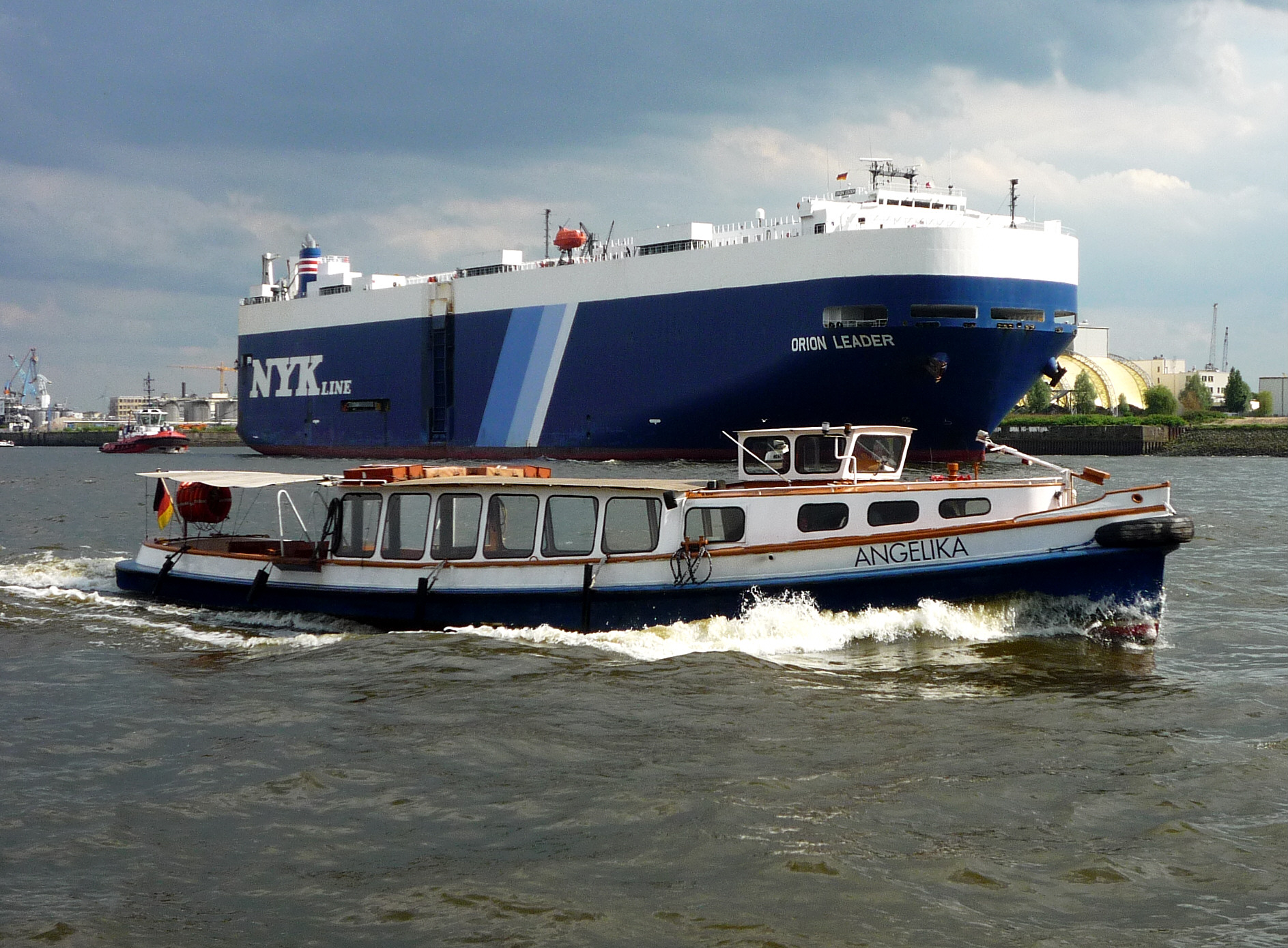 Barkasse Angelika auf der Unterelbe in Höhe von Hamburg-Neumühlen, ORION LEADER IMO Number: 9182289 MMSI Number: 357742000 Callsign: 3FSG9 Length: 200 m Beam: 32 m